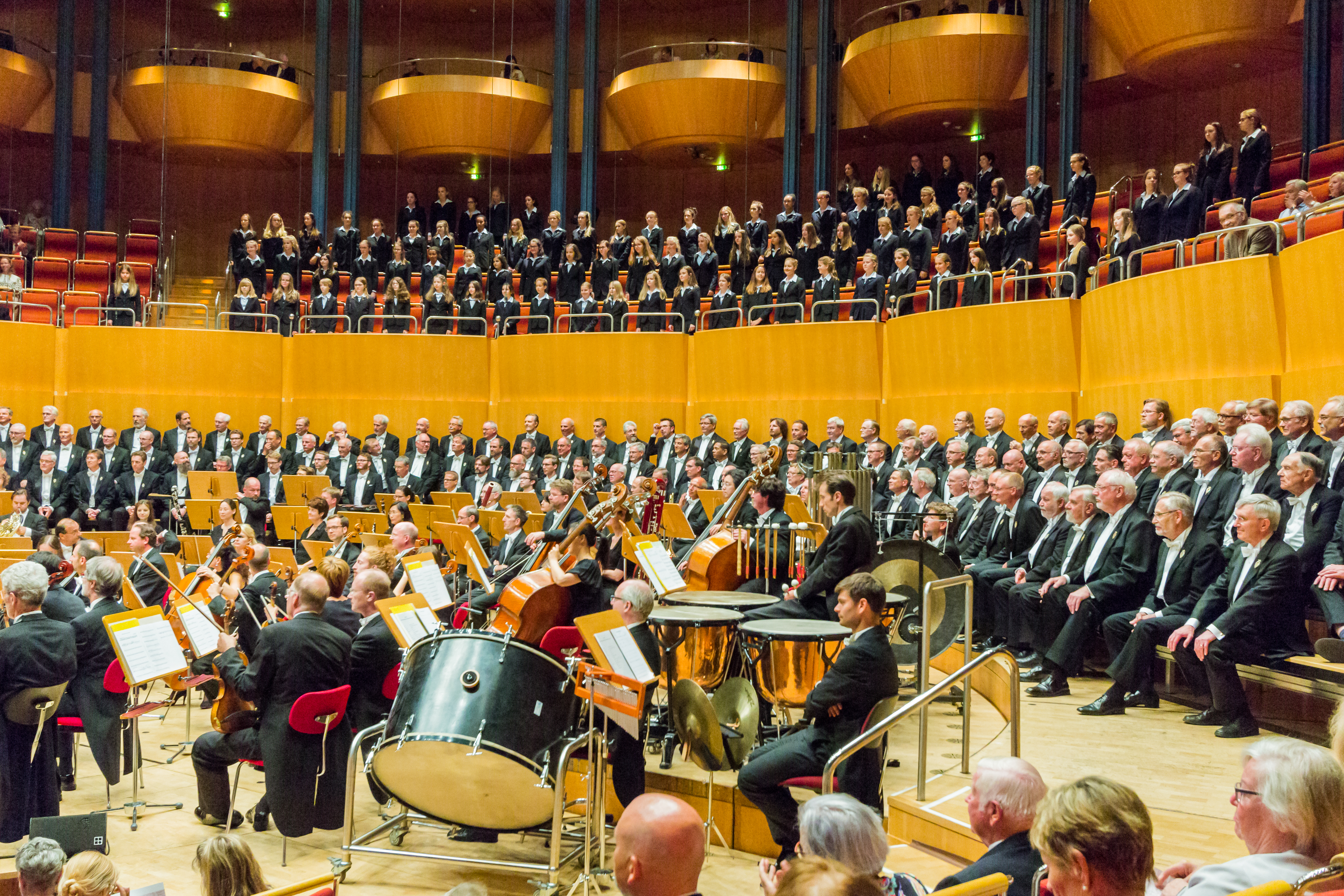 Festakt zum 175. Jubiläum des Zentral-Dombau-Vereins und des Kölner Männer-Gesang-Vereins Foto: Musiker der Neuen Philharmonie Westfalen, dahinter Sänger des Kölner Männer-Gesang-Vereins. Auf dem Balkon der Mädchenchor am Kölner Dom